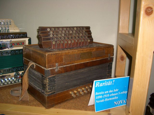 Novak Harmonika Dated between 1890 and 1900